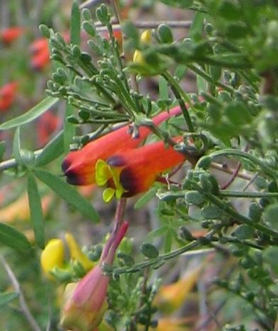 Tropaeolum tricolor Sweet, soldadillo, Cajon de Maipo, Matorral Central Chile